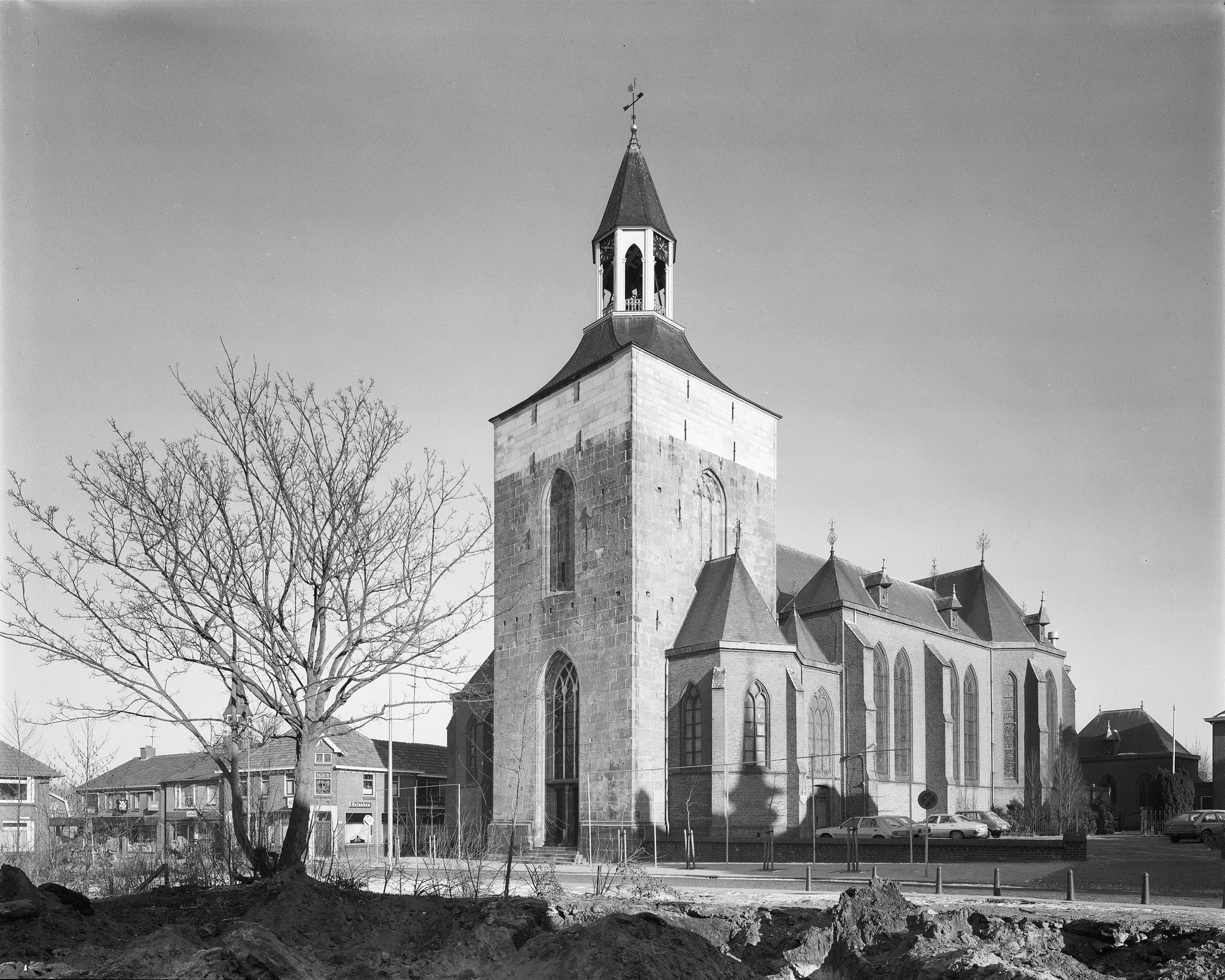 Rooms-Katholieke Kerk en Toren: overzicht zuid-west zijde